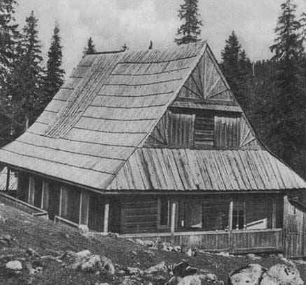 Nieistniejące schronisko na Hali Goryczkowej